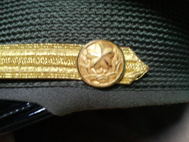 70式後期幹部正帽耳章